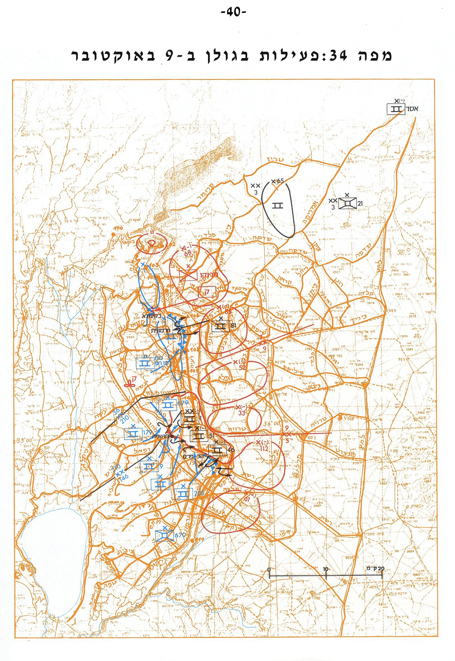 מפה 34 - פעילות בגולן ב-9 לאוקטובר - מלחמת יום הכיפורים